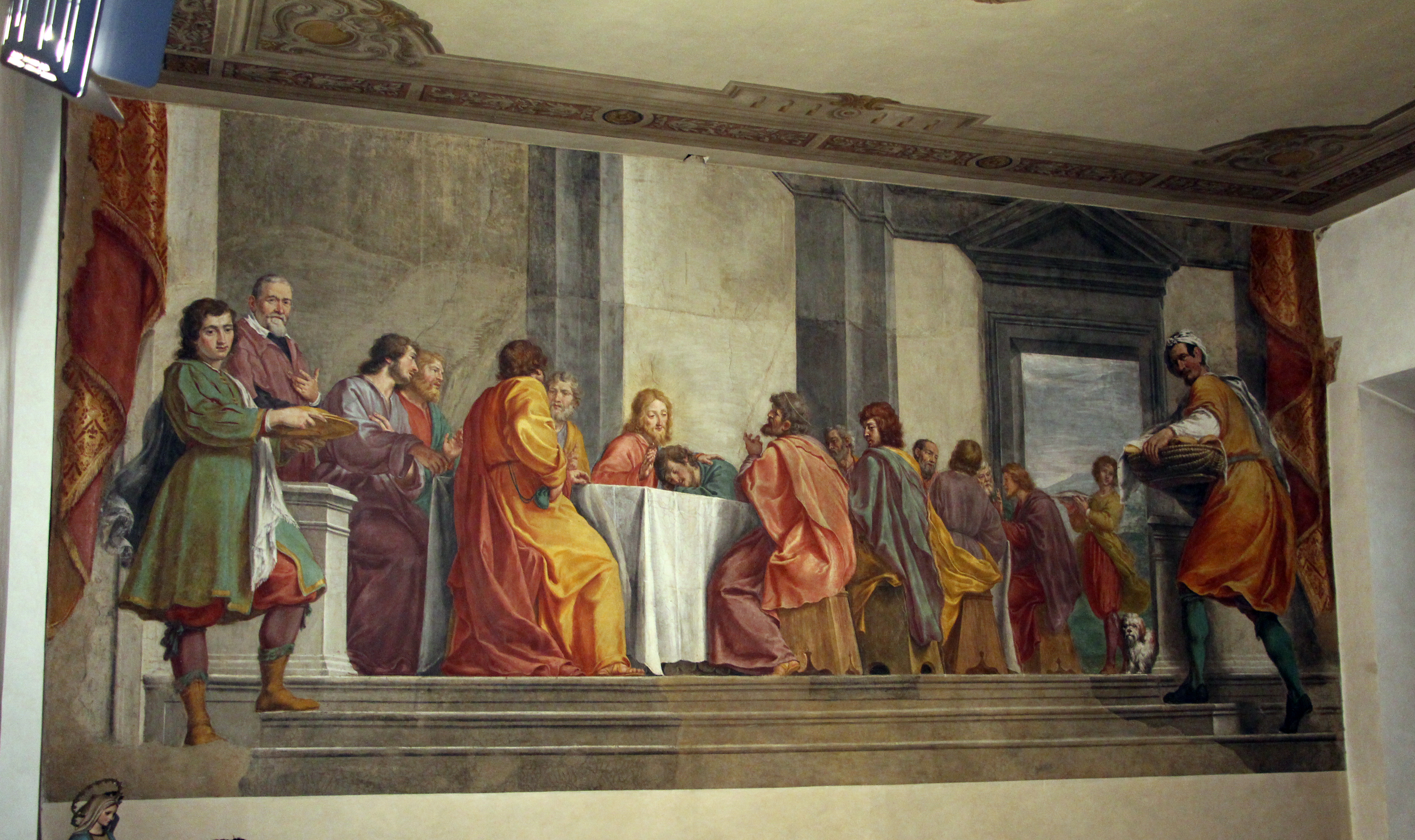 Ospedale Bonifacio - Cappella